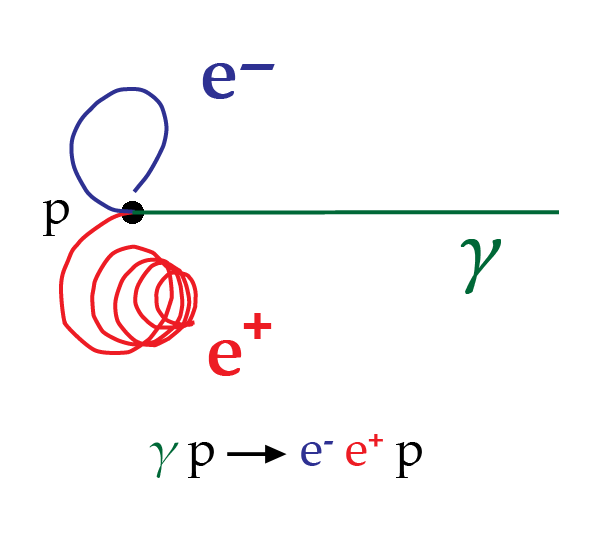 In die Desy-Blasenkammer wurde hochenergetische Gammastrahlung eingeschossen (Emax kleiner 5,8 GeV). Die Blasenkammer war mit Wasserstoff gefüllt. Es wurden also hauptsächlich Ereignisse der Art γ + p → … {\displaystyle \gamma +p\rightarrow \ldots } beobachtet. Hier ein Ausschnitt, der offensichtlich Paarbildung am Wasserstoffkern zeigt. Die Bestimmung des Ladungsvorzeichens erfolgte mittels delta-Elektronen.